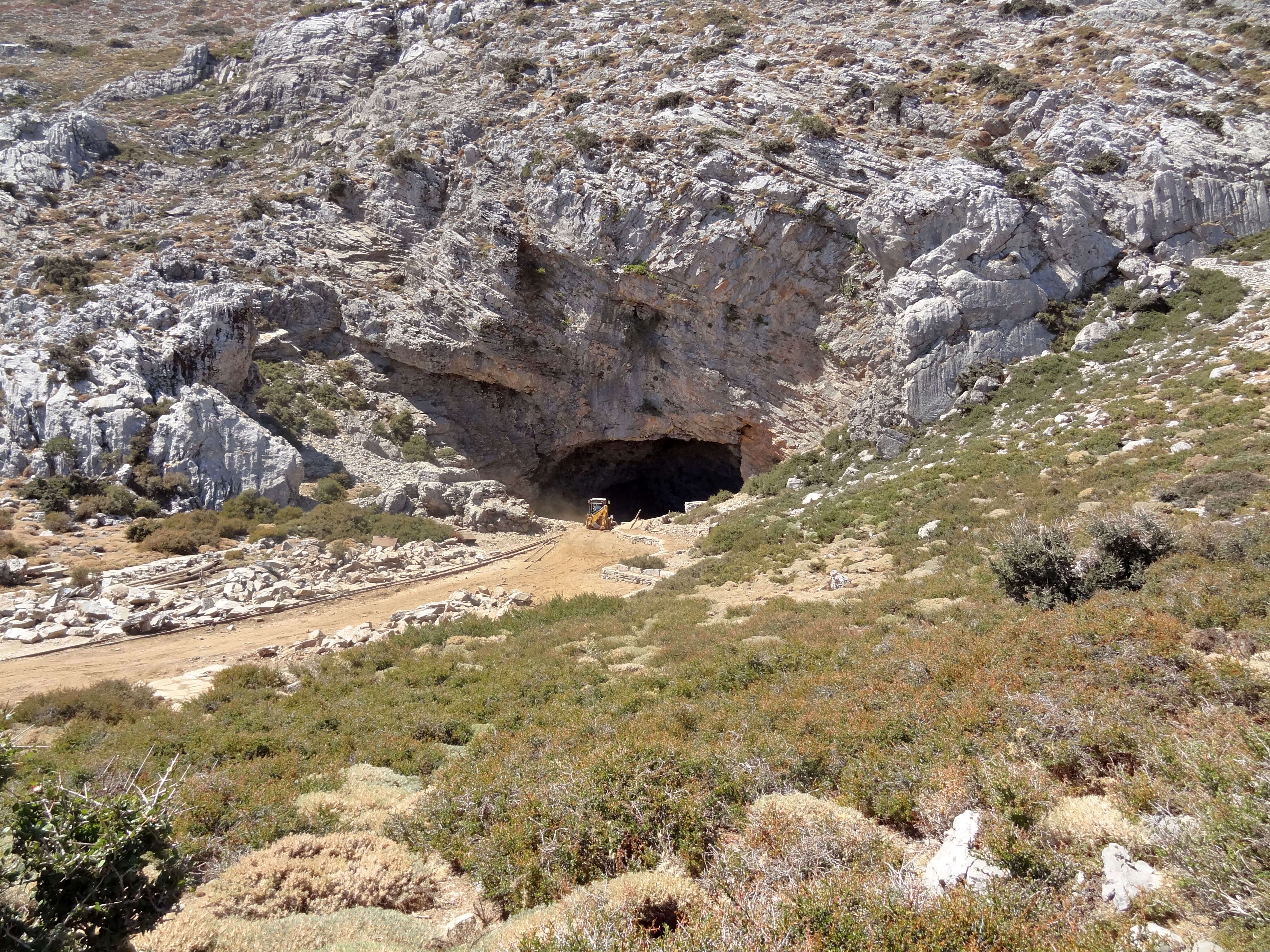 Idäische Grotte an der Nida-Hochebene, Gemeinde Anogia, Regionalbezirk Rethymno, Kreta, Griechenland